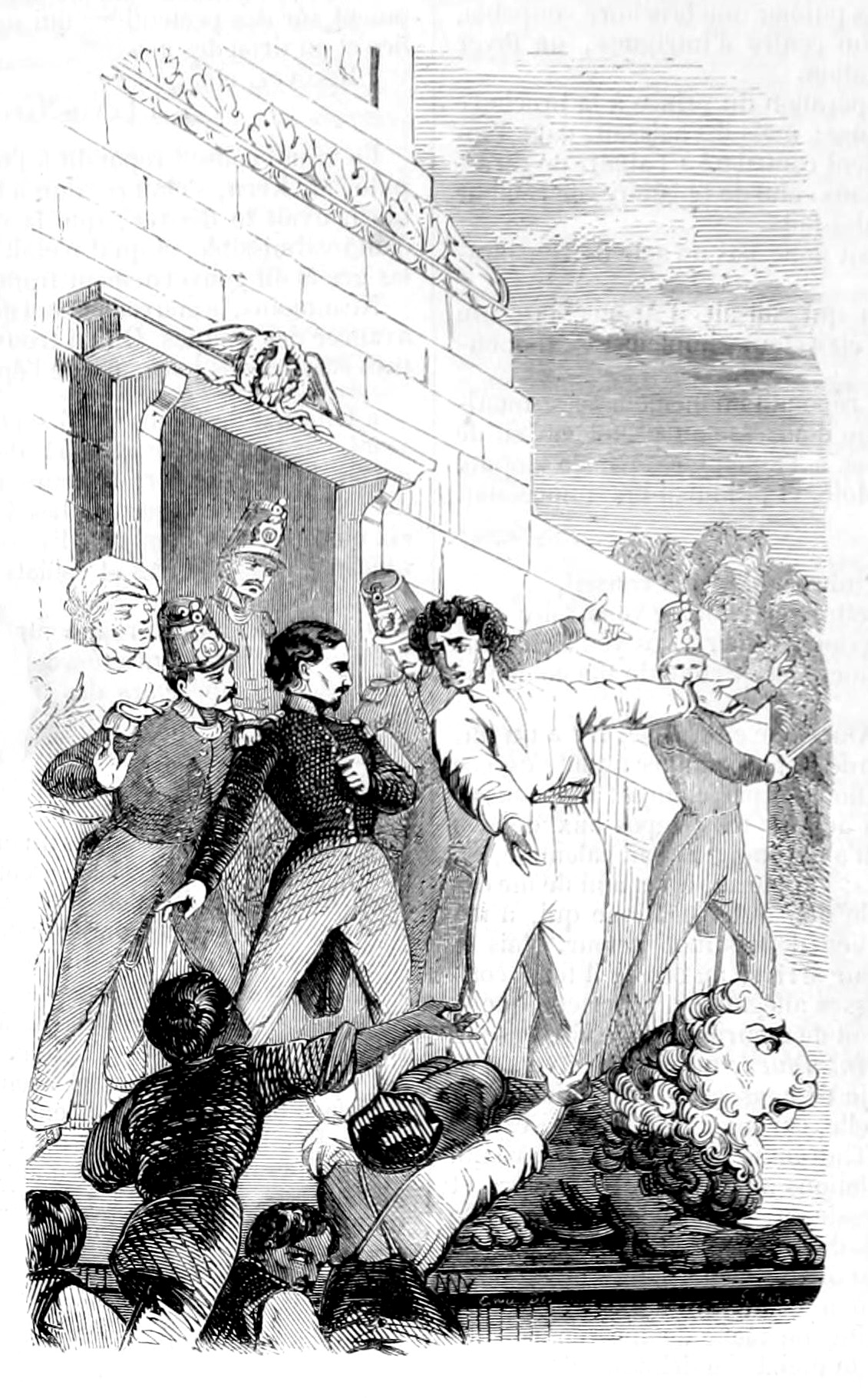 Tentative de soulèvement de Boulogne (1840). Louis-Napoléon et ses partisans au pied de la colonne.